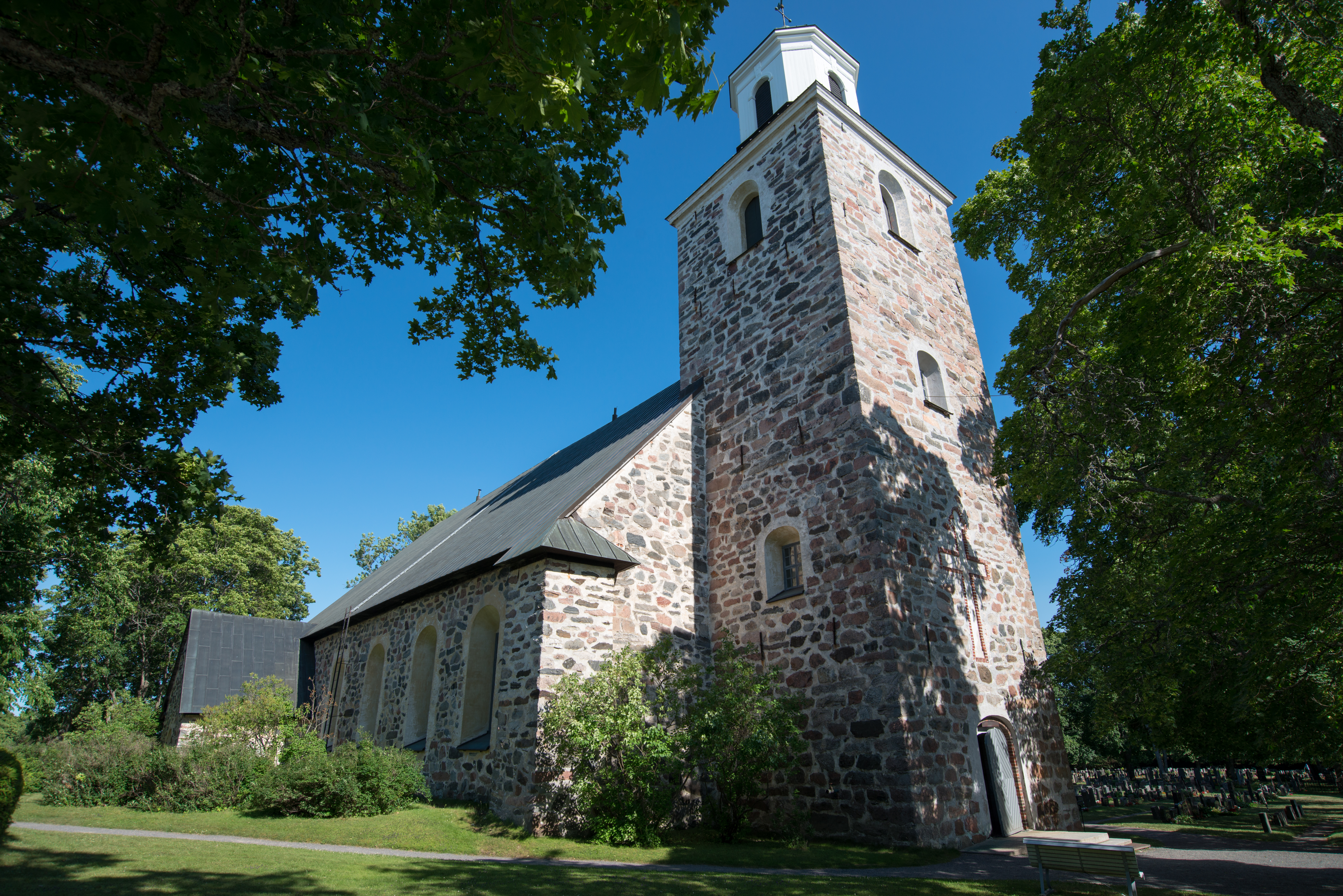 Kemiön kirkko